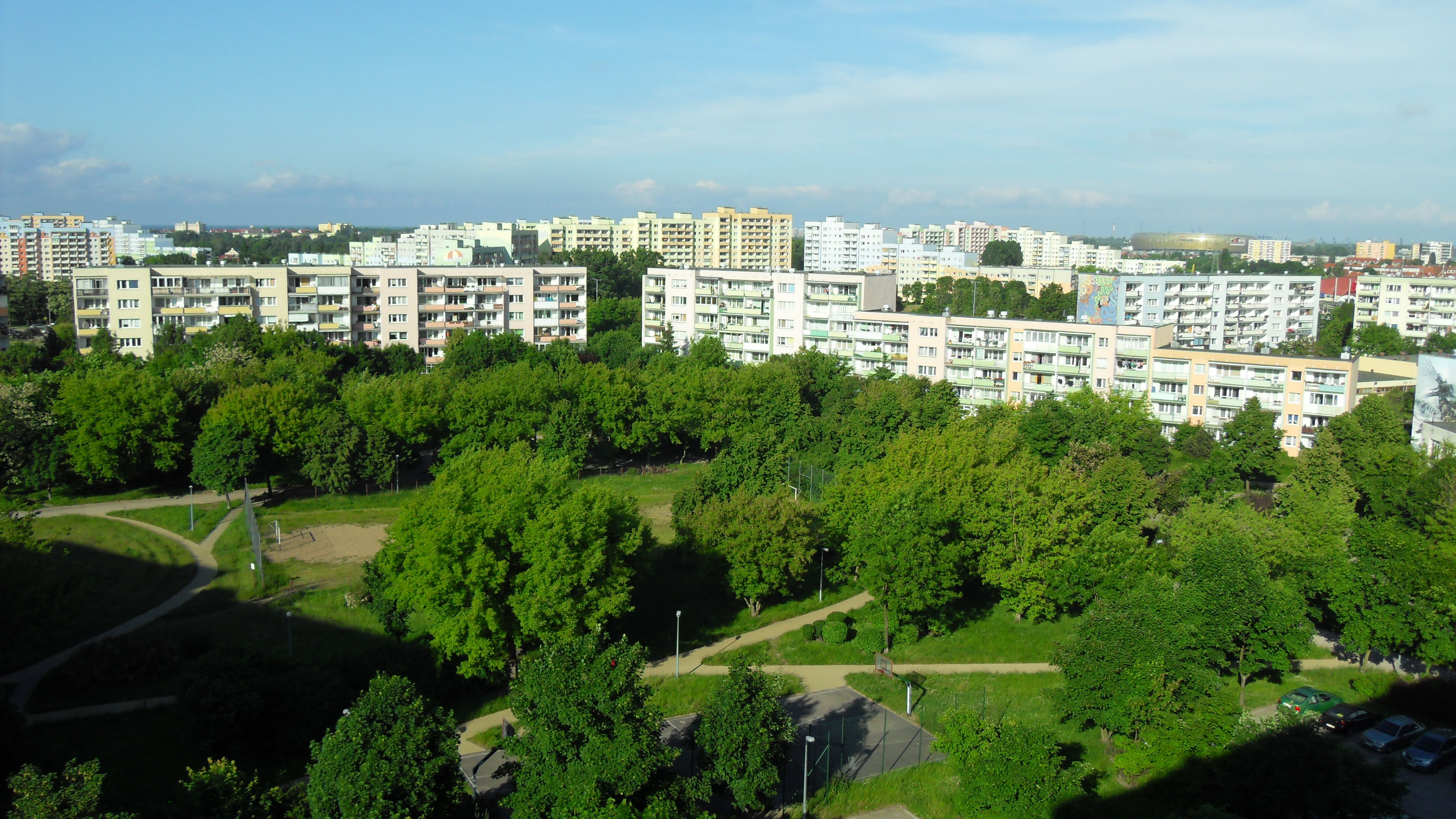 Gdańsk Zaspa Młyniec, ul. Nagórskiego 7 i 9.